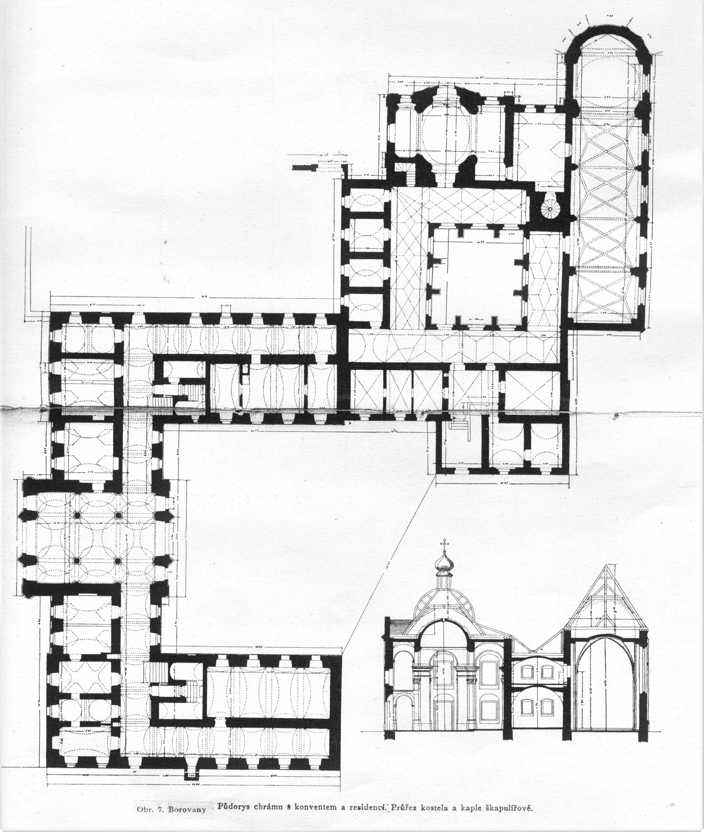 Půdorys kláštera Borovany z knížky SOUPIS PAMÁTEK HISTORICKÝCH A UMĚLECKÝCH V POLYTICKÉM OKRESU ČESKOBUDĚJOVICKÉM